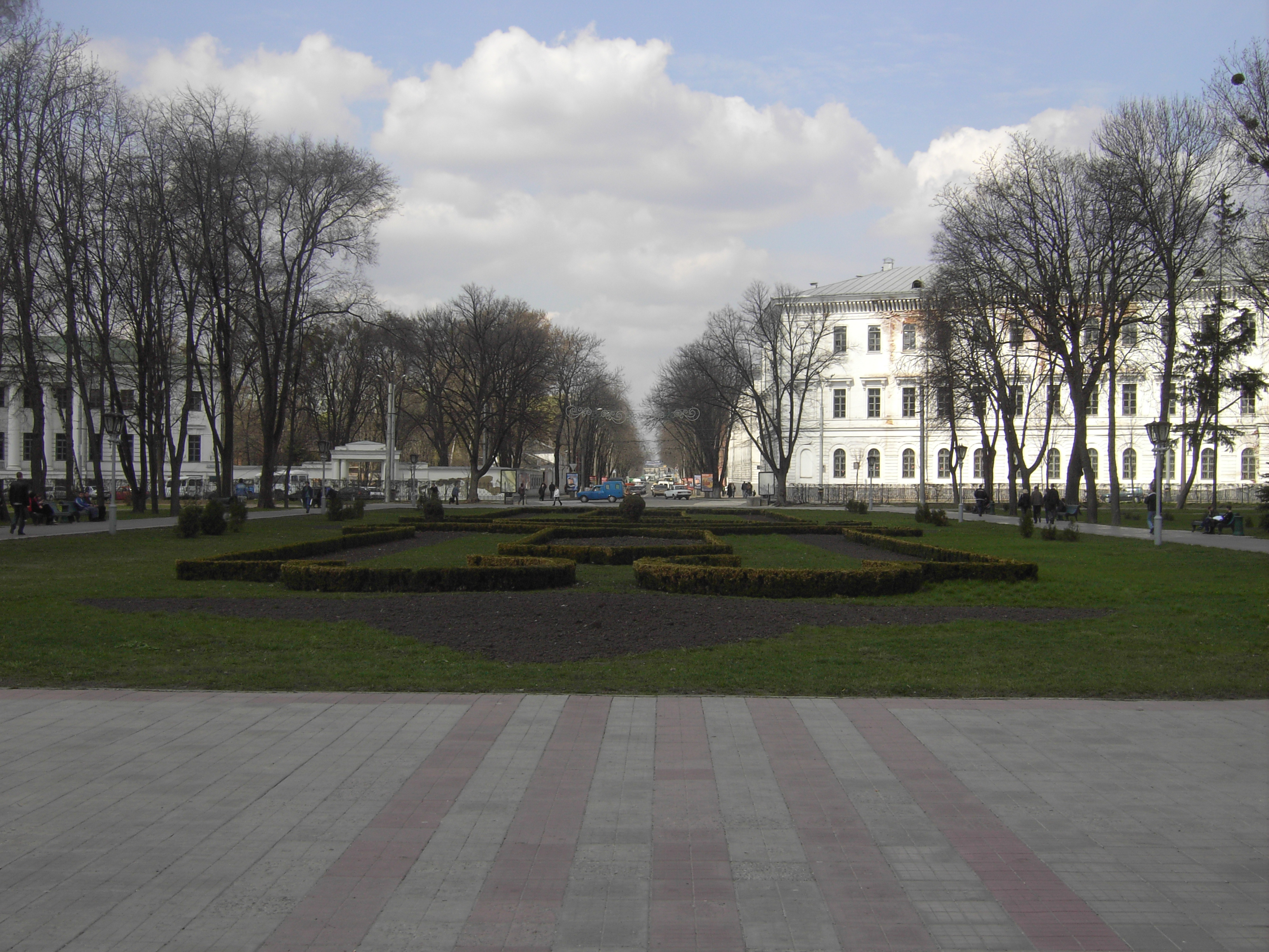 Poltava / Полтава